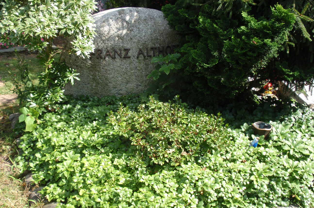 Grab von Franz Althoff, Althoff (Zirkus)